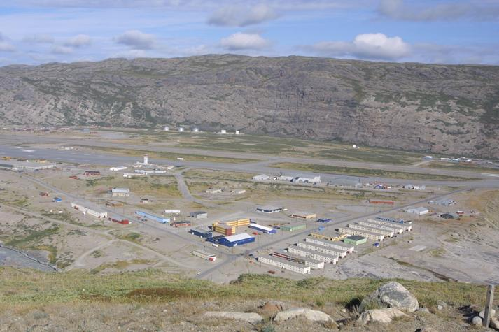 billede af Kangerlussuaq taget fra Blackridge i 2003.